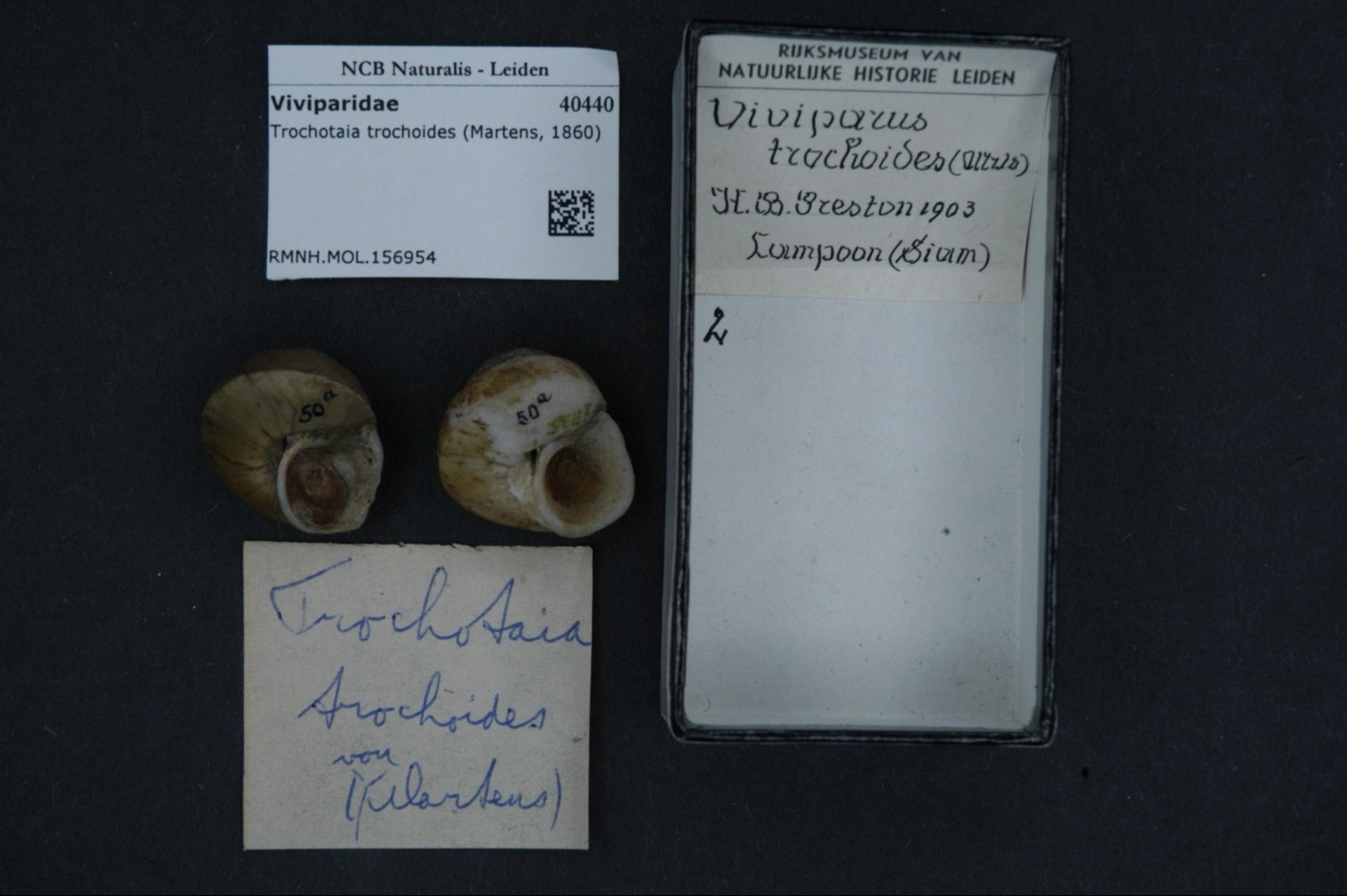 Trochotaia trochoides (Von Martens, 1860)